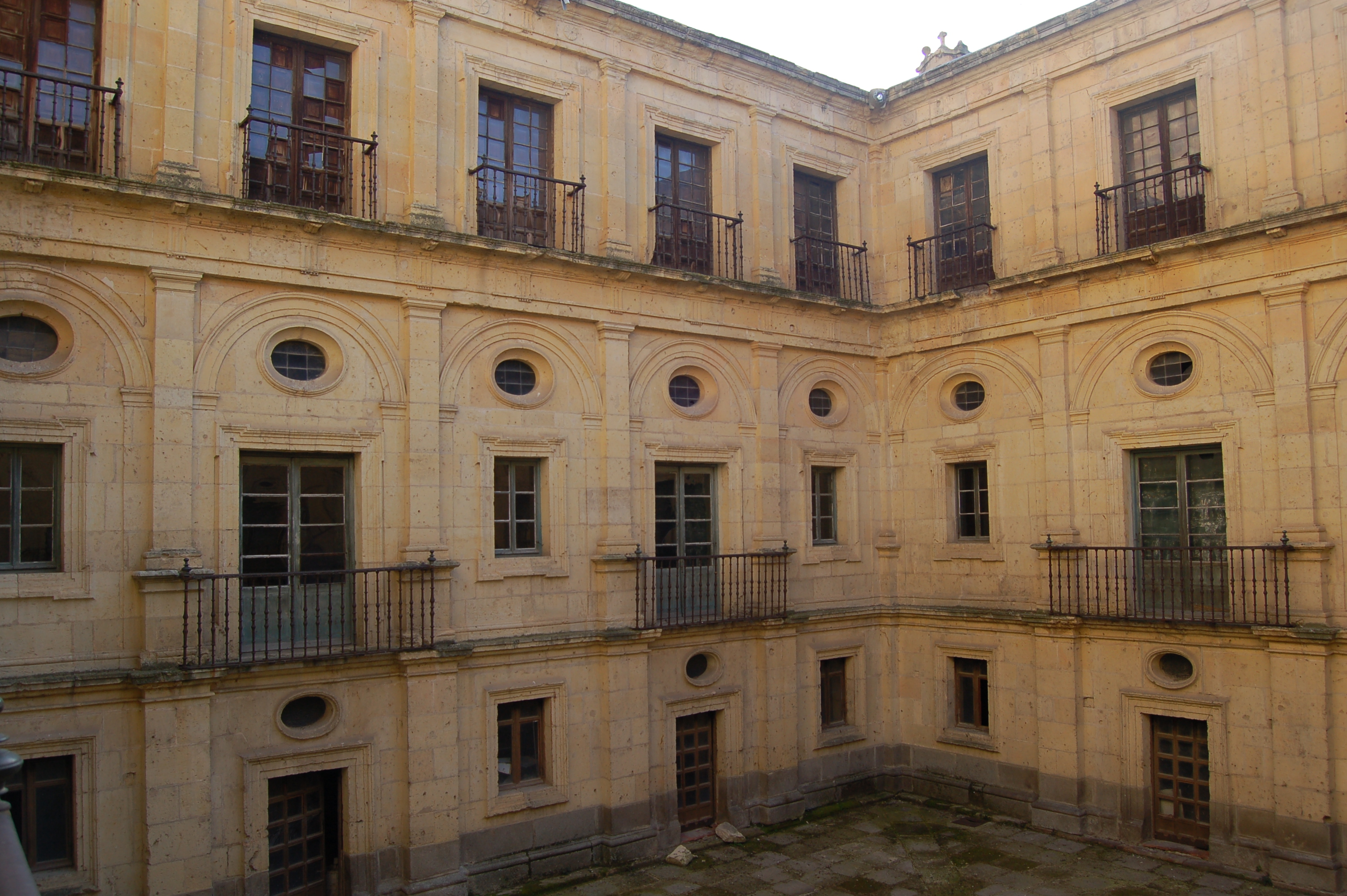 Colegio de la Compañía de Jesús en Segovia. Claustro barroco de Juan de Mugaguren